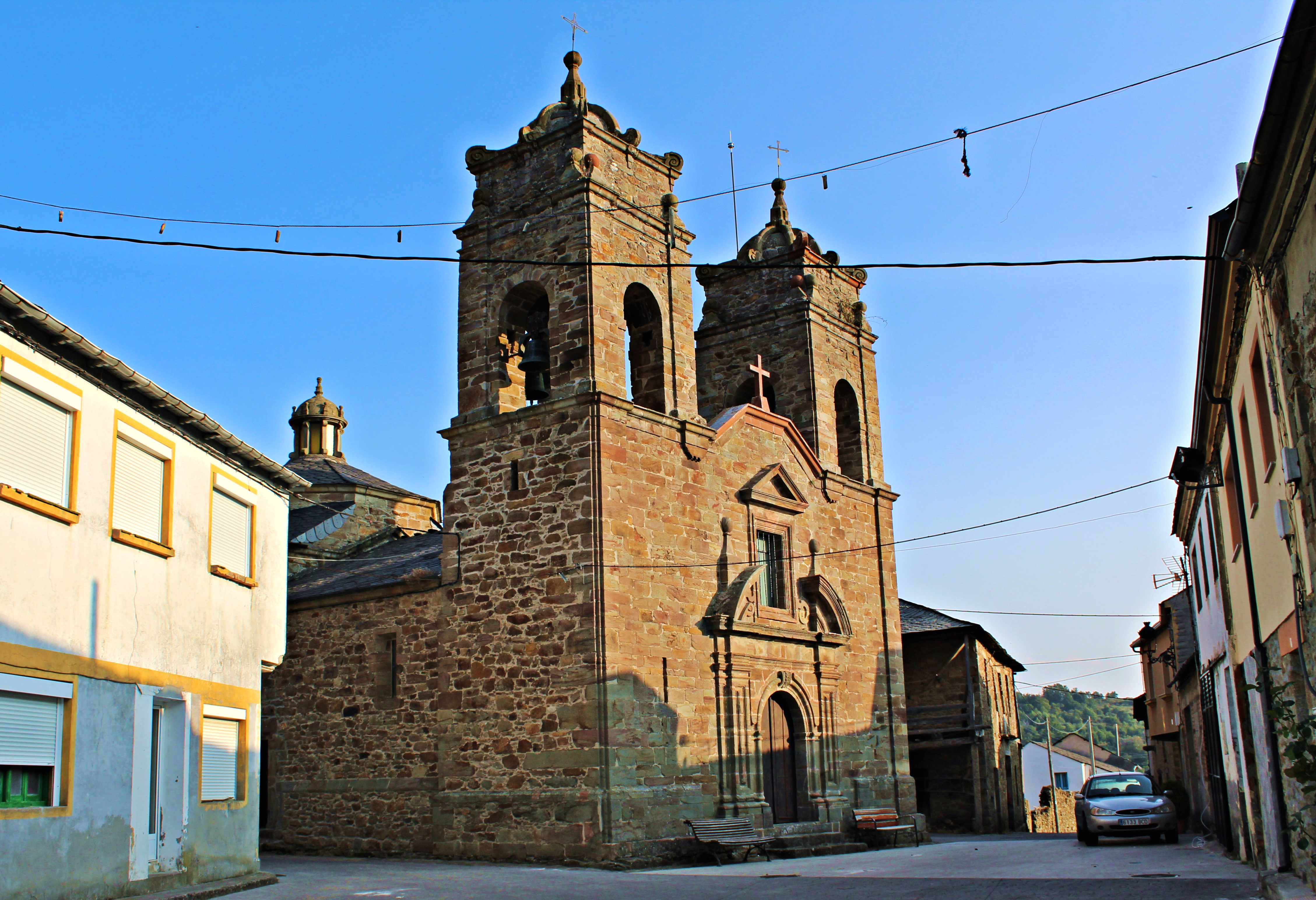 Langre, localidad de Berlanga del Bierzo, comarca de El Bierzo, provincia de León